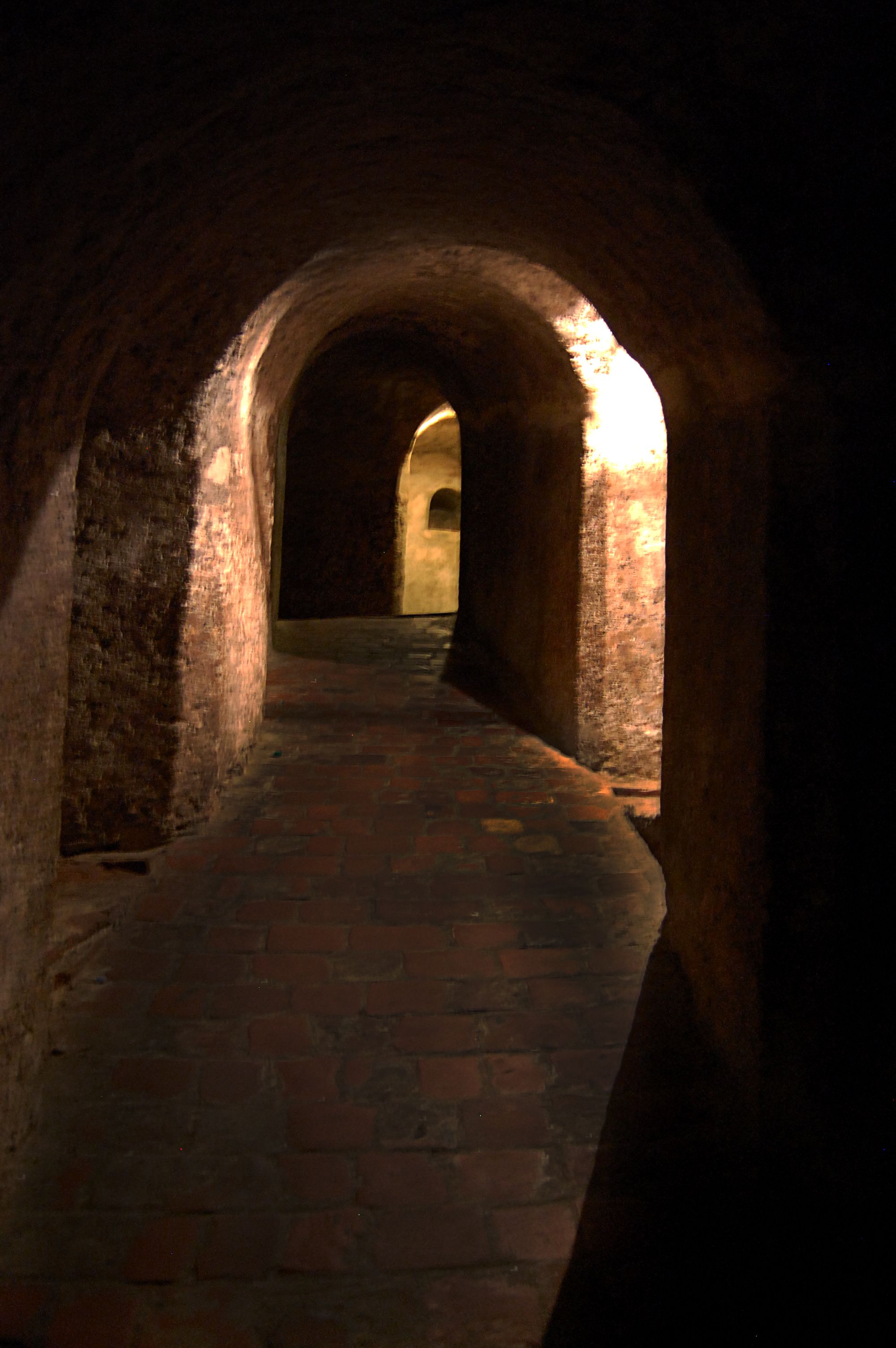 Castillo de San Felipe de Barajas Corredores internos